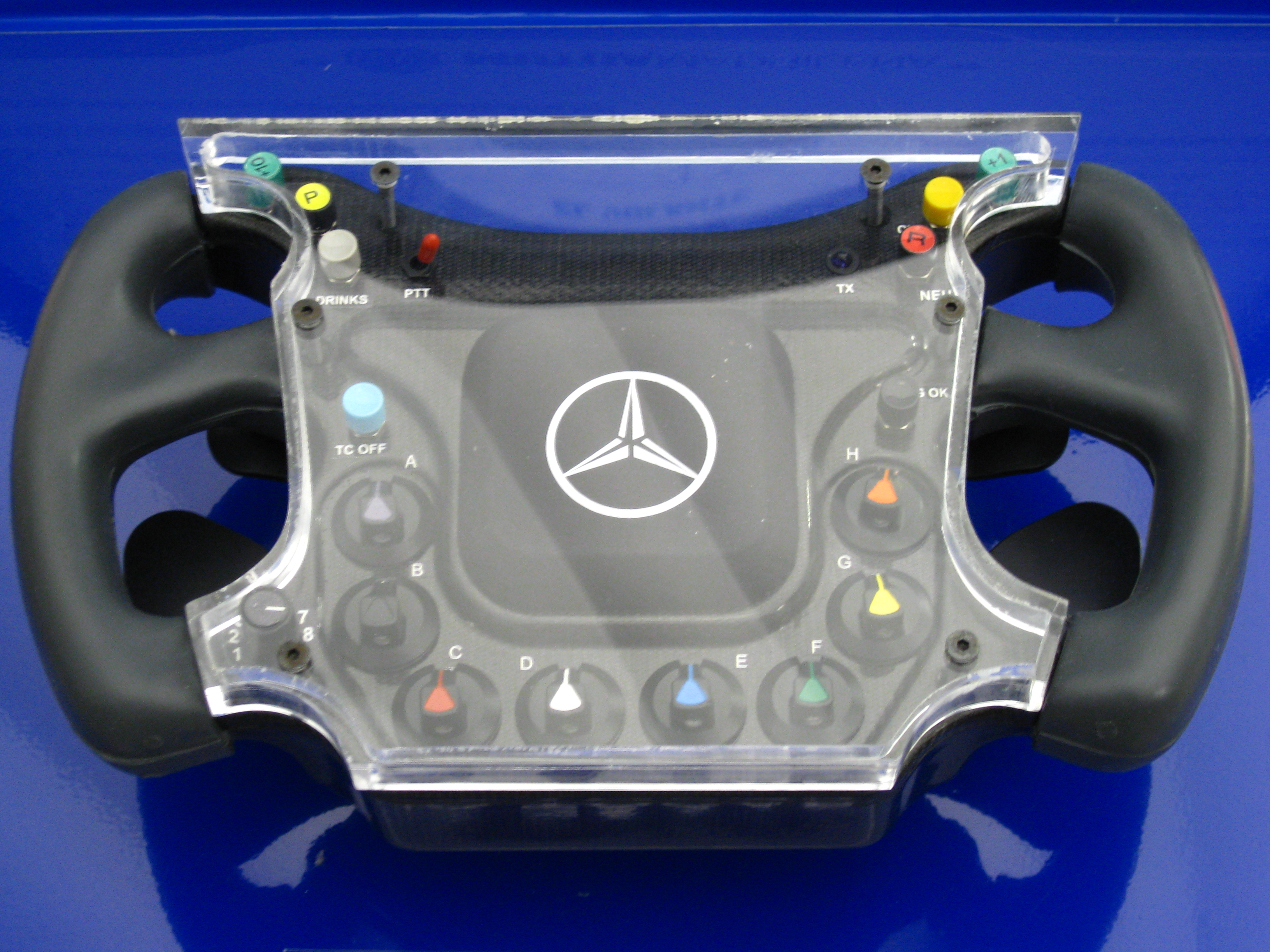 Volante McLaren Mercedes del coche de Fernando Alonso año 2007